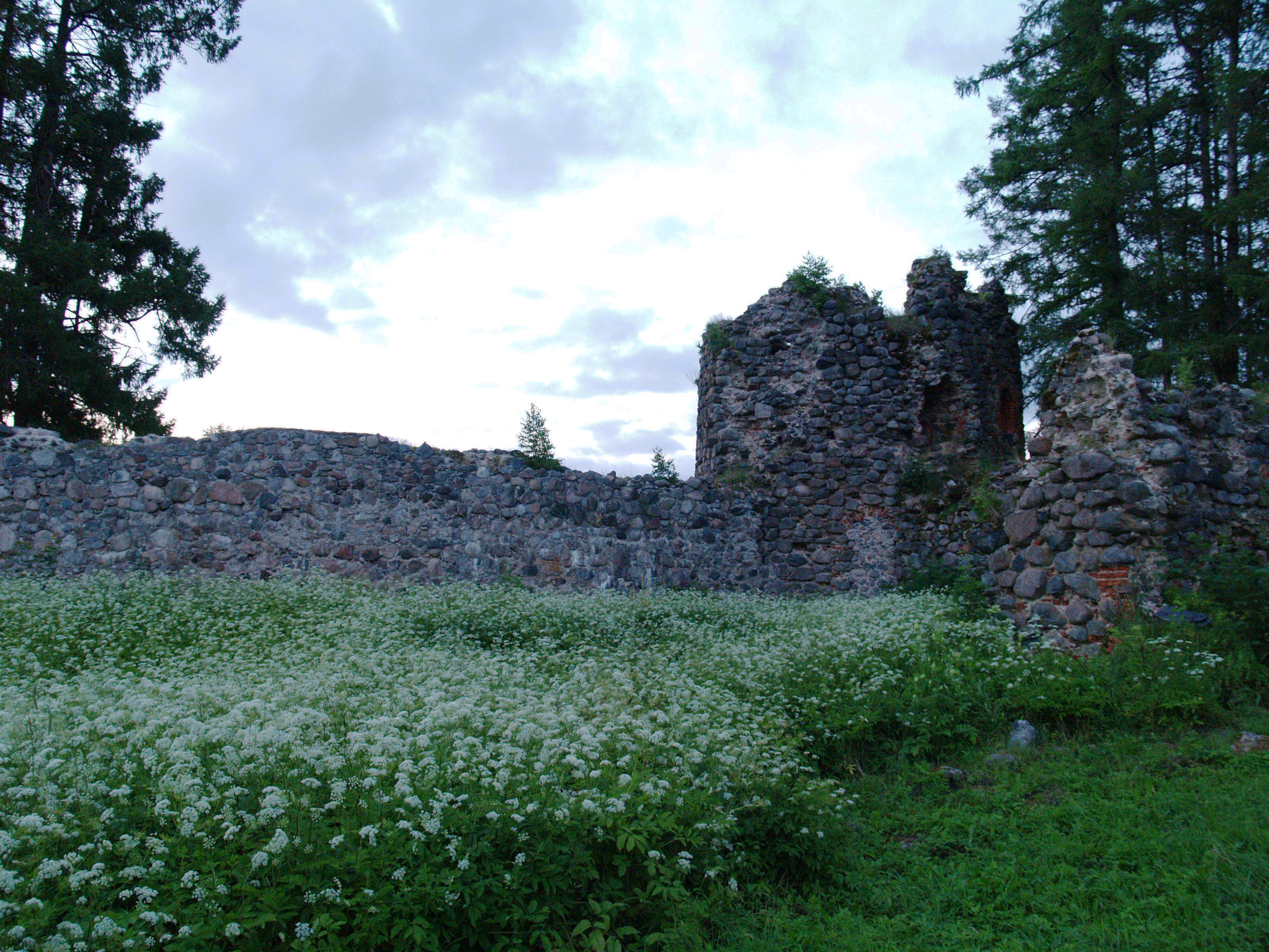 Härgmäe ordulinnuse siseõu. Põhjakülg.